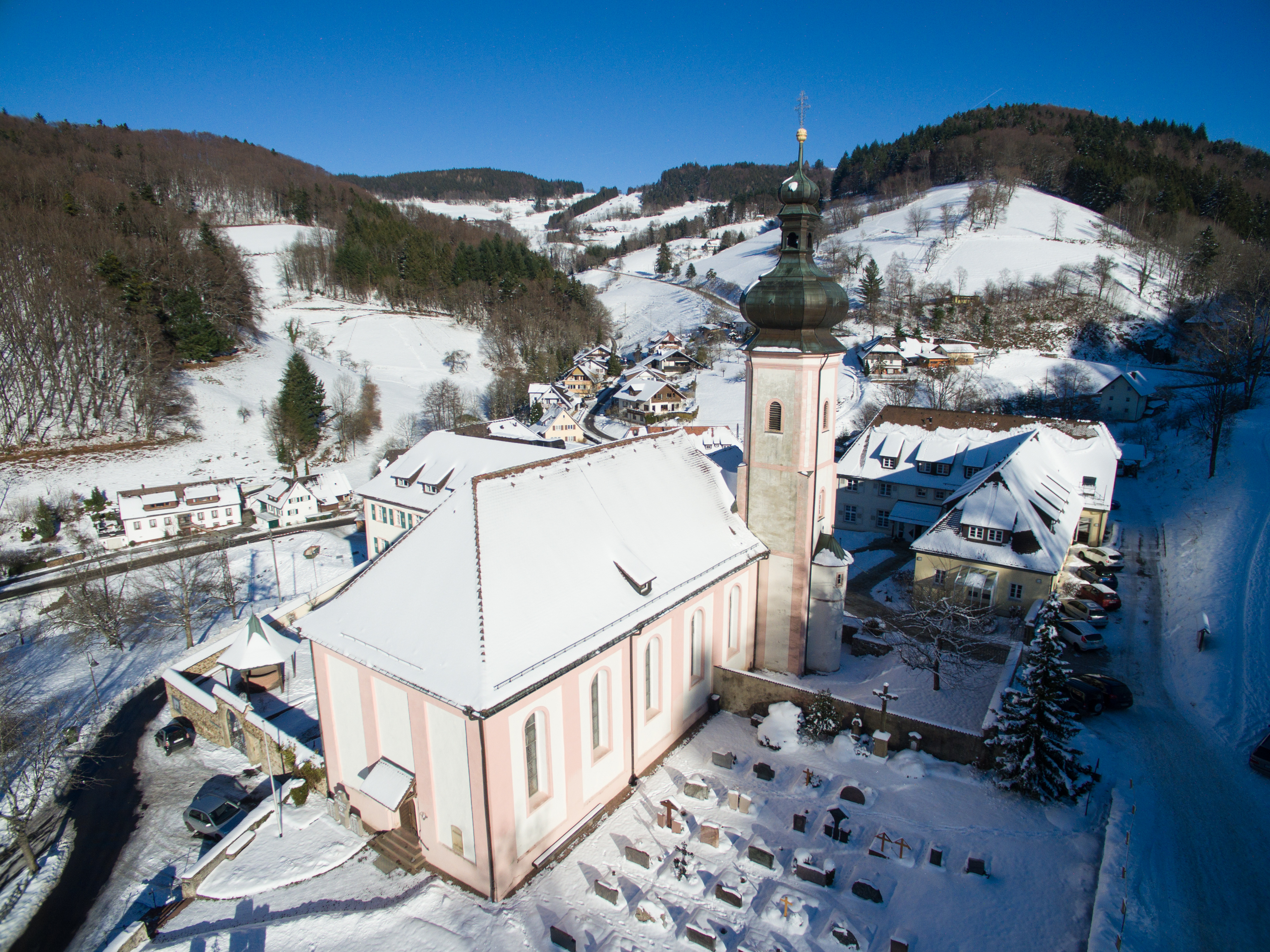 Luftbild St. Ulrich im Schwarzwald